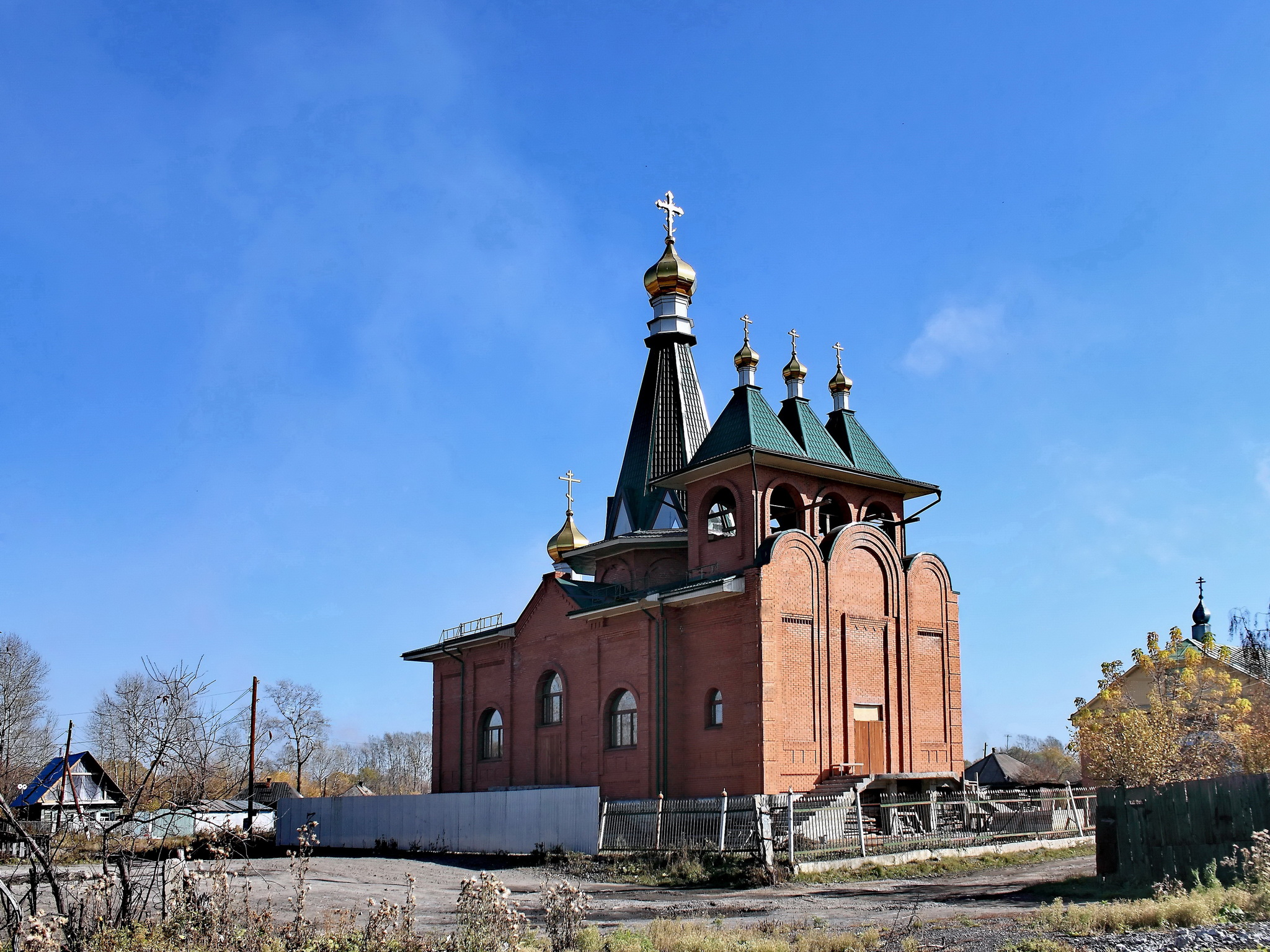 Свято - Никольский приход